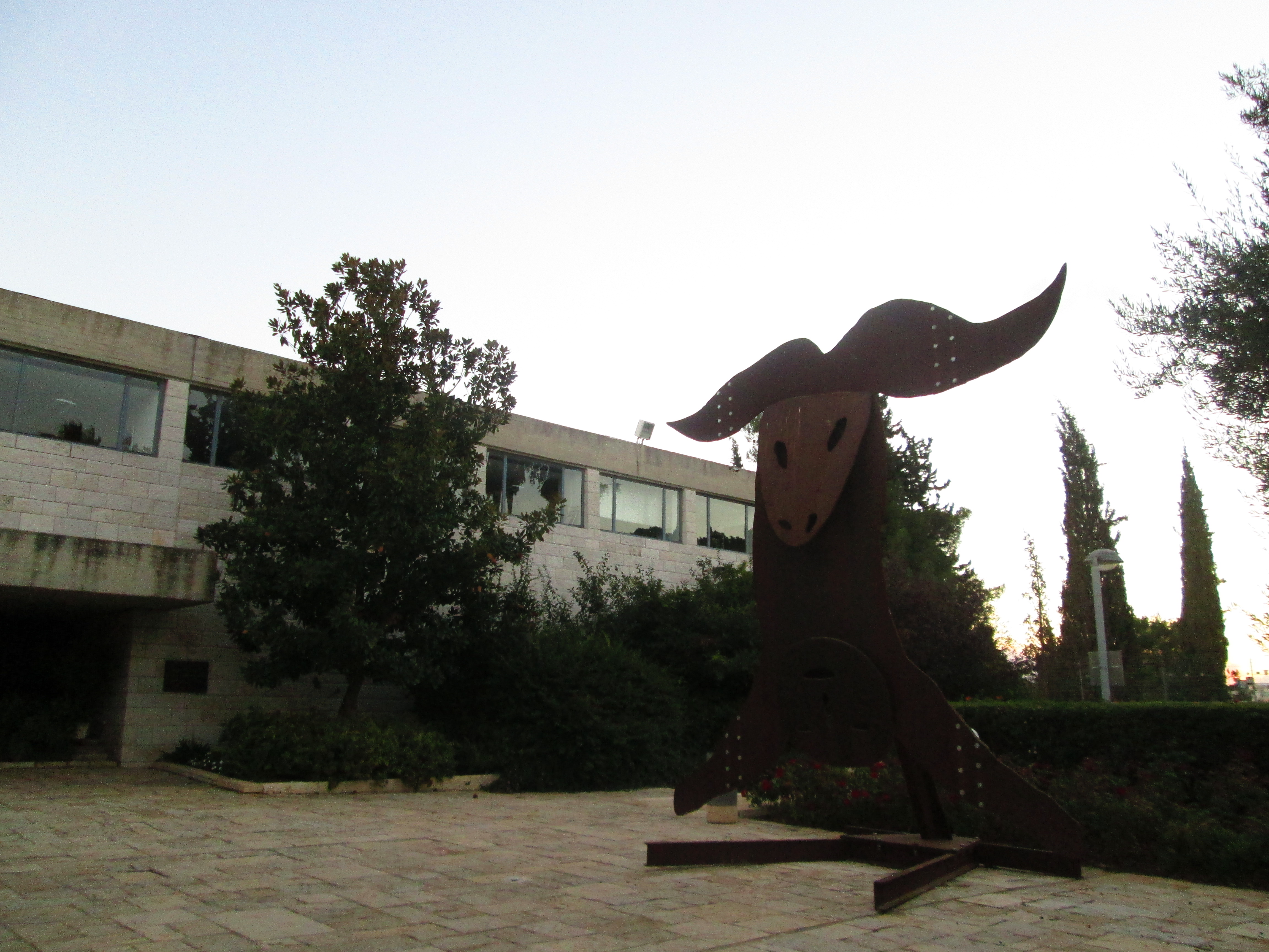 מכון ון ליר בירושלים (הוקם ב-1959) הוא מכון מחקר ללימודים מתקדמים במדעי הרוח והחברה הפועל בירושלים.